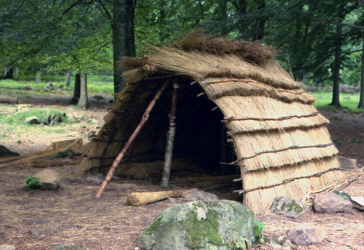 Stenåldersprojektet Forntid i Nutid i Skånes djurpark, Sverige